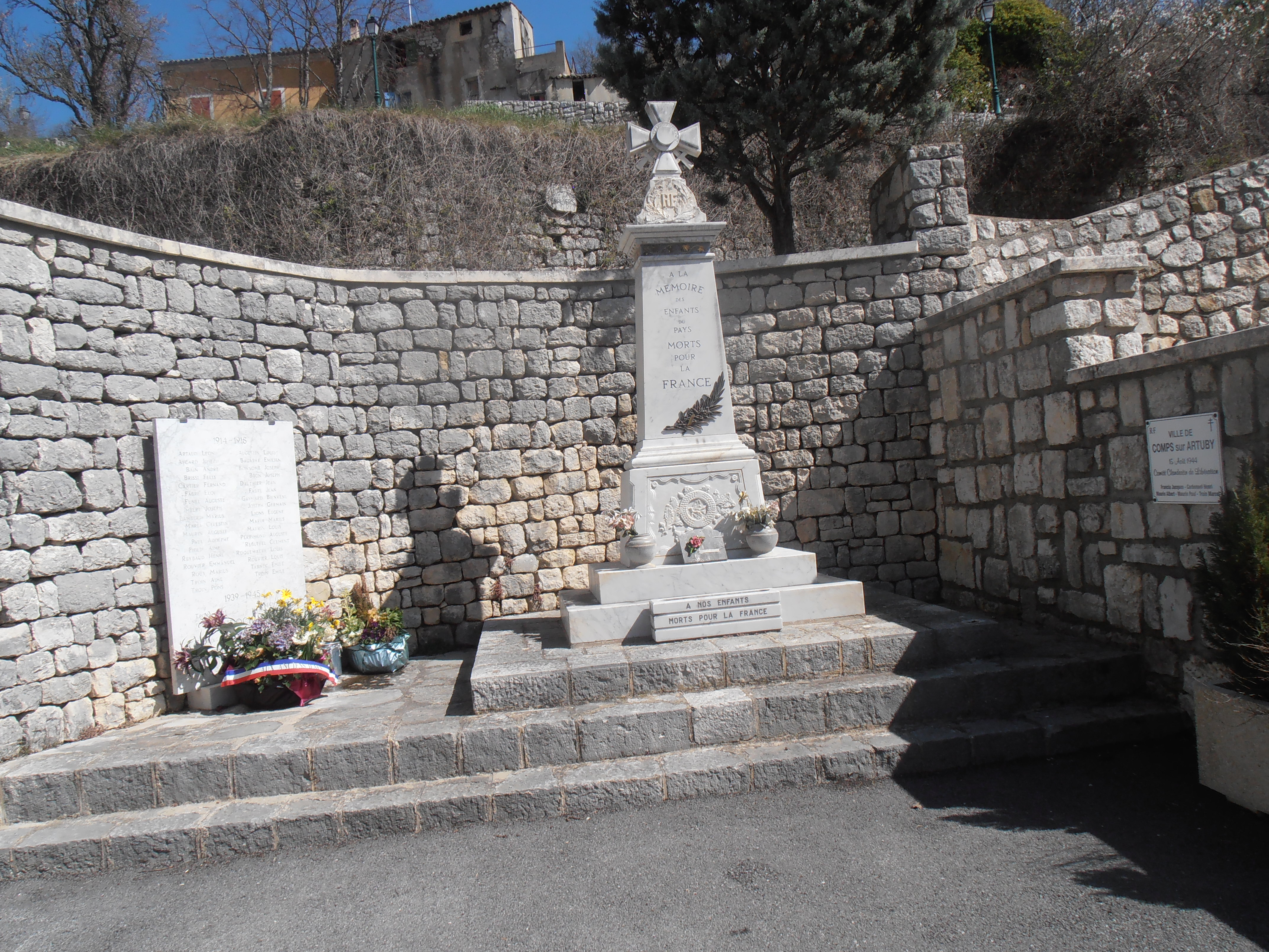 Var, Comps-sur-Artuby, Monument aux morts